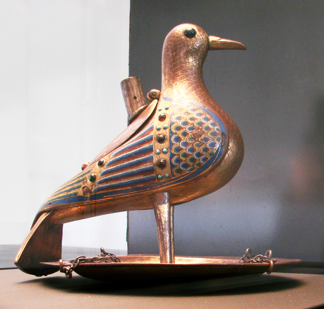 Colombe eucharistique. Cuivre doré et émail champlevé, Limoges, 1210-1220. Provient de l'église de Raincheval dans la Somme. Musée de Picardie à Amiens.